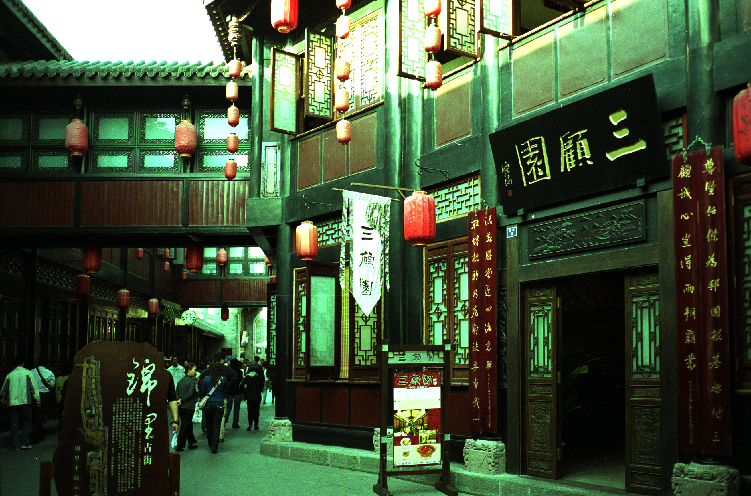 成都锦里古街